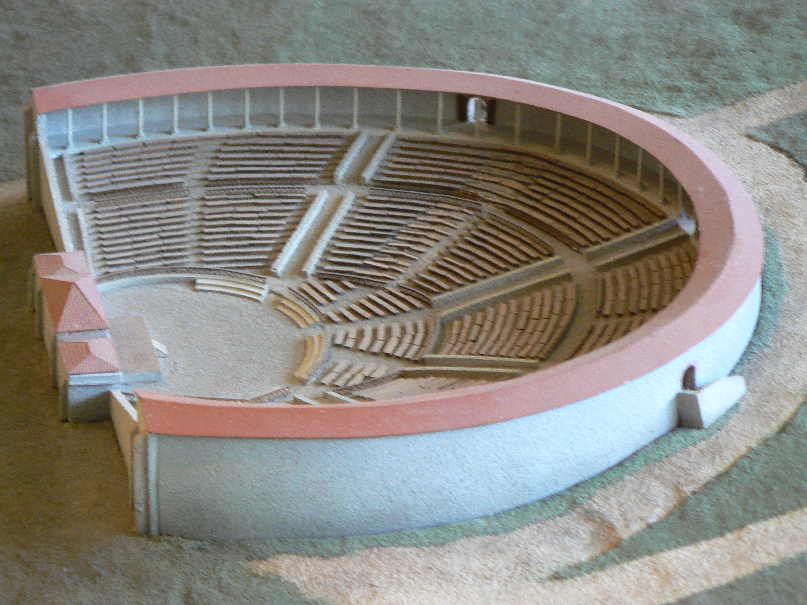 maquette, secteur du théâtre au musée archéologique départemental de Jublains